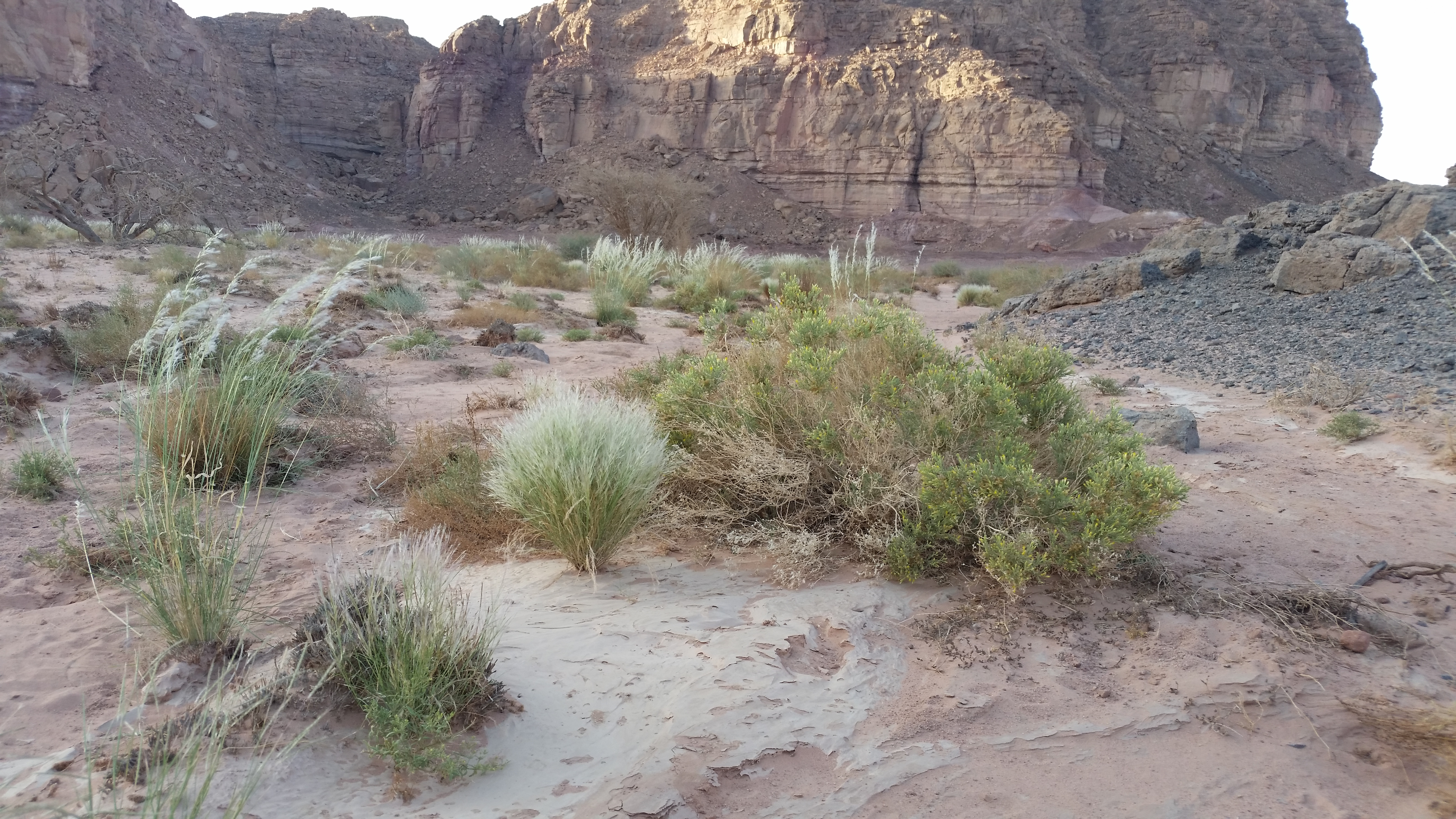 צמחייה (פלורה) אחרי שנה גשומה בעמק ססגון באזור הערבה